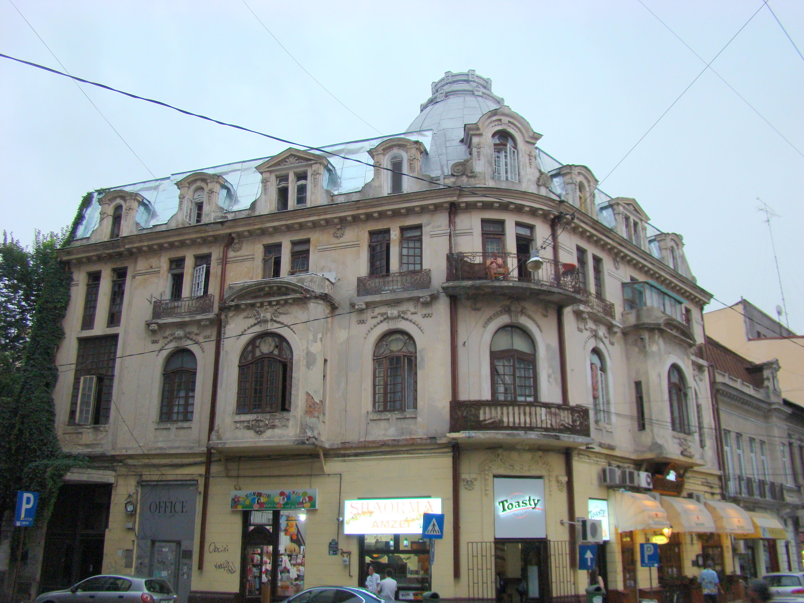 Casă monument istoric, str. Tache Ionescu, nr.29